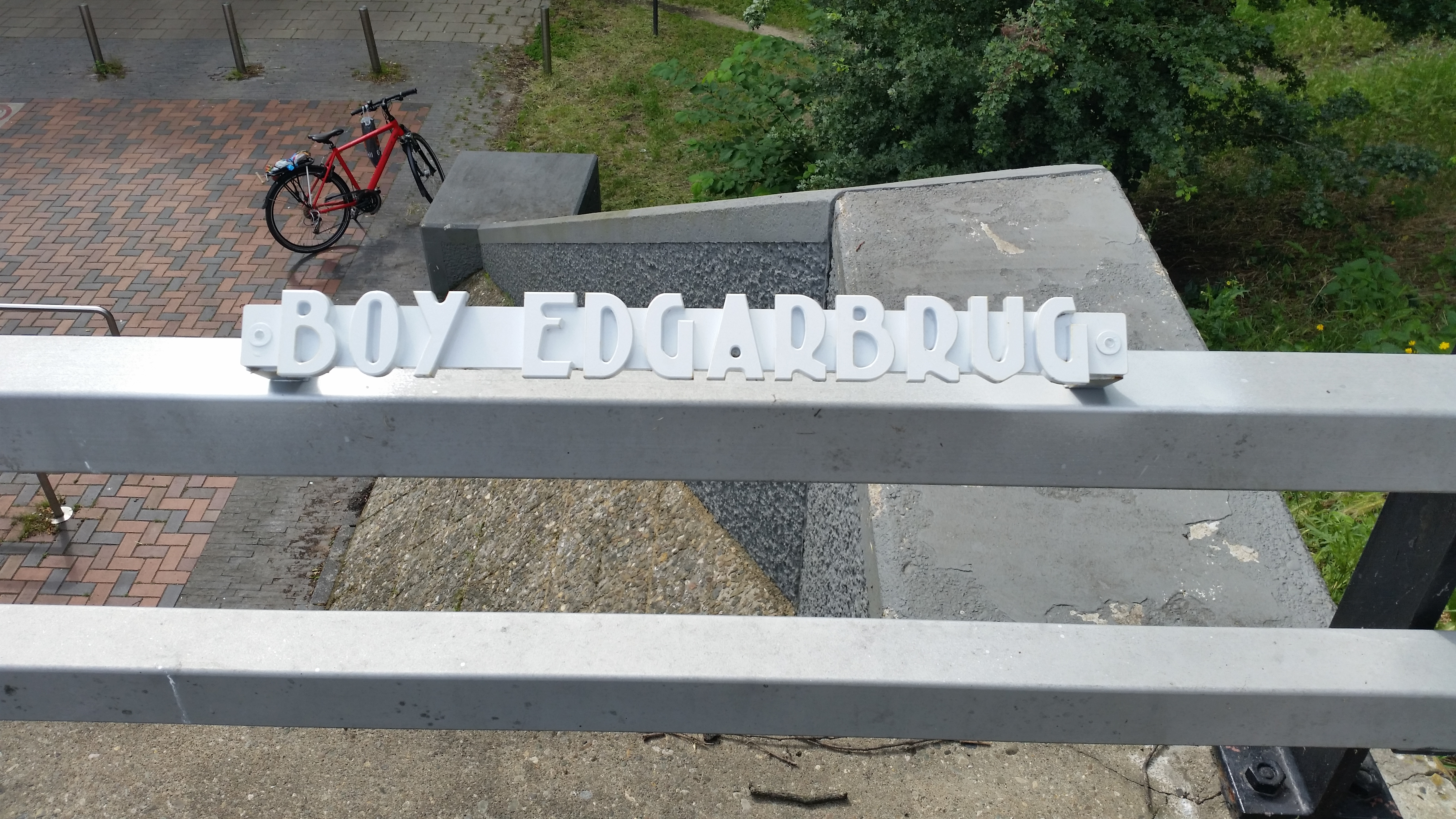 Impressie van de Boy Edgarbrug (brug 1064) in Amsterdam Zuidoost